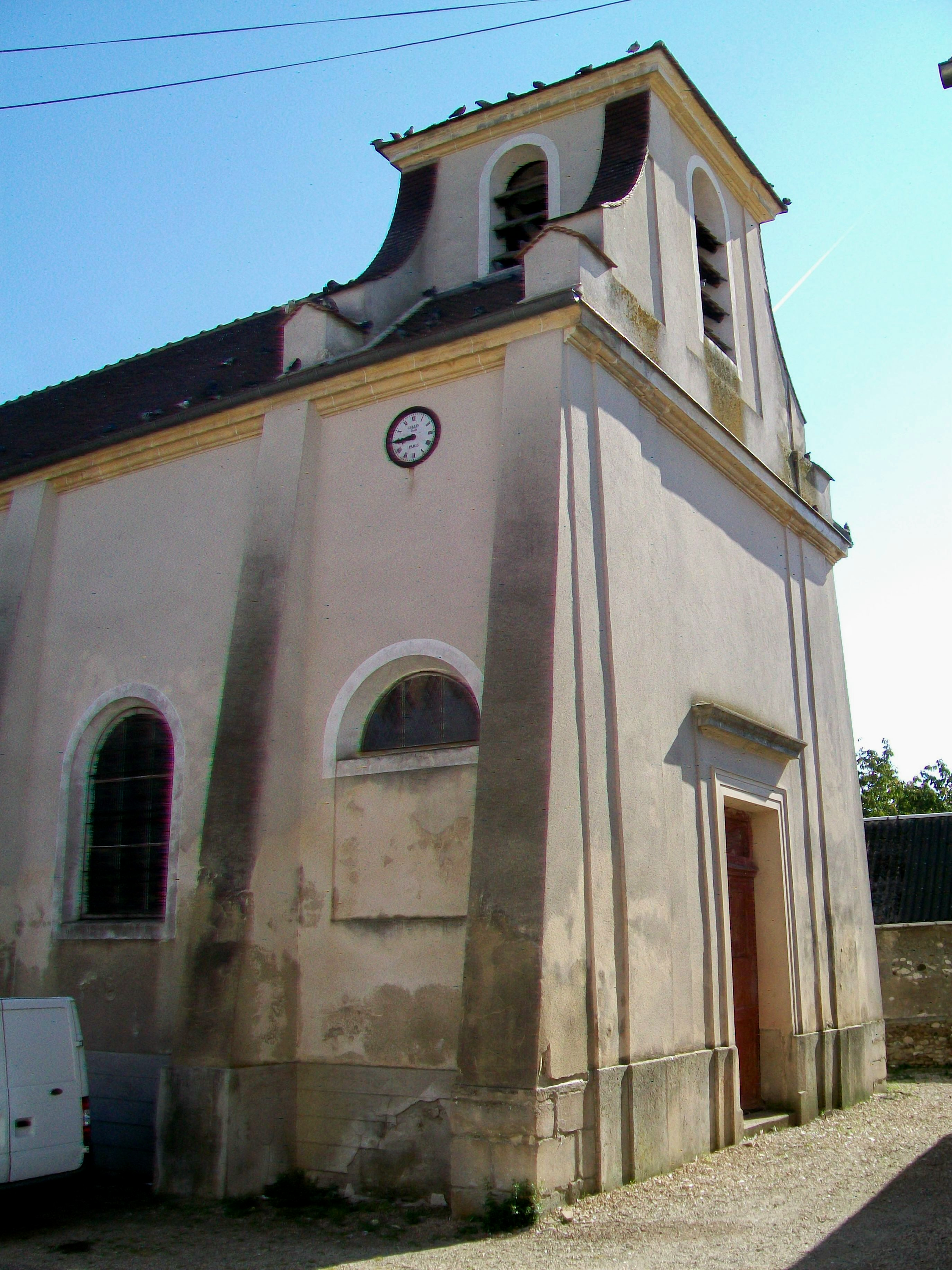 Façade ouest de l'église Saint-Nicolas, qui donne sur le mur d'enceinte de la grande ferme.